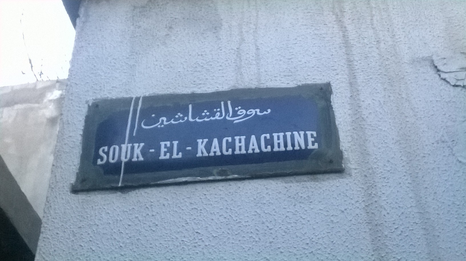 La médina de Tunis مدينة تونس العتيقة